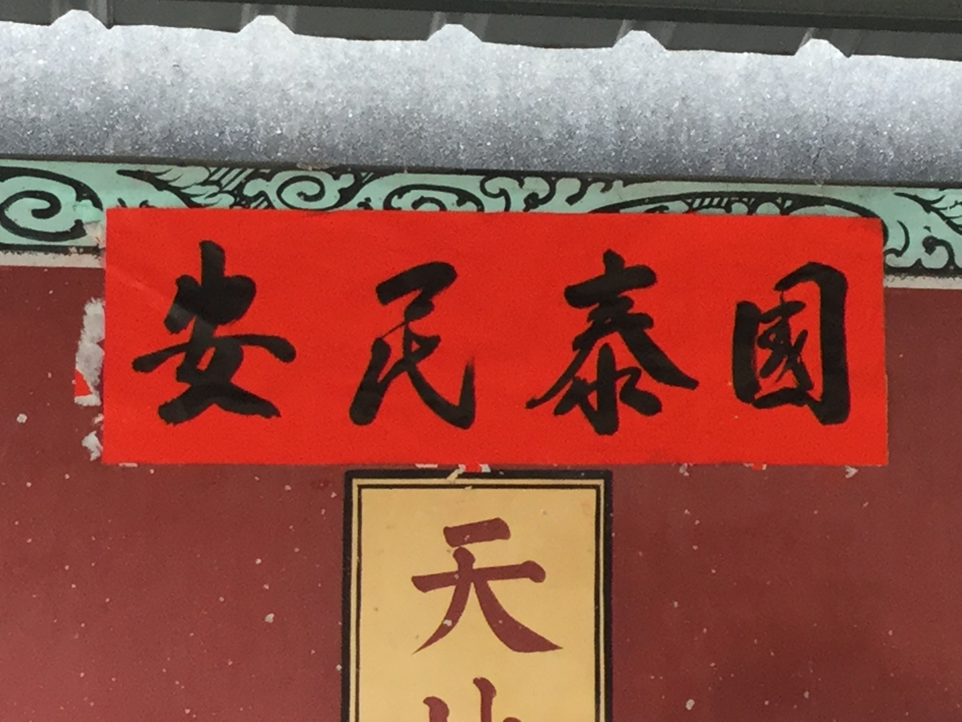 “国泰民安”的右起